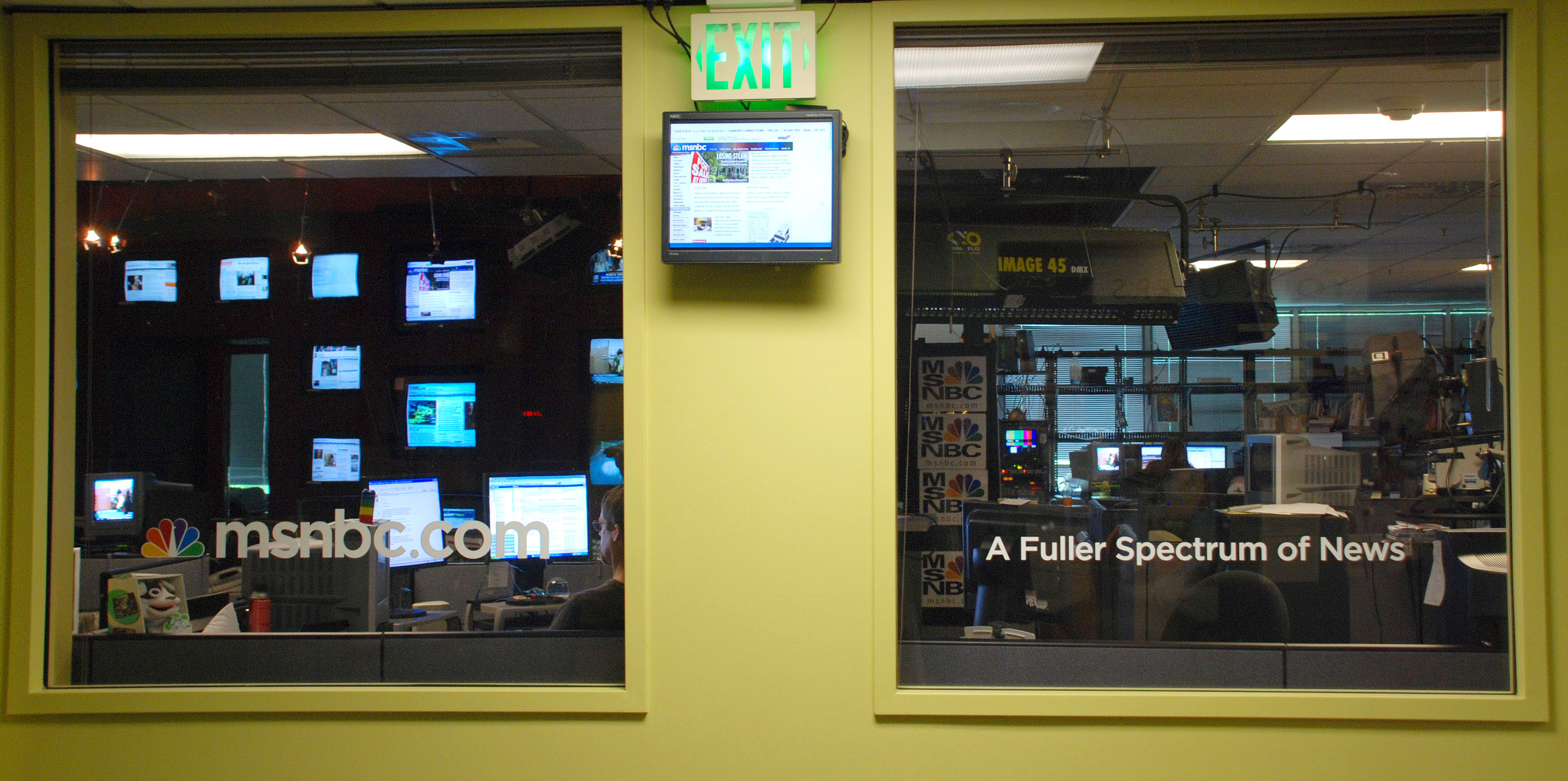 NewsroomOutside In